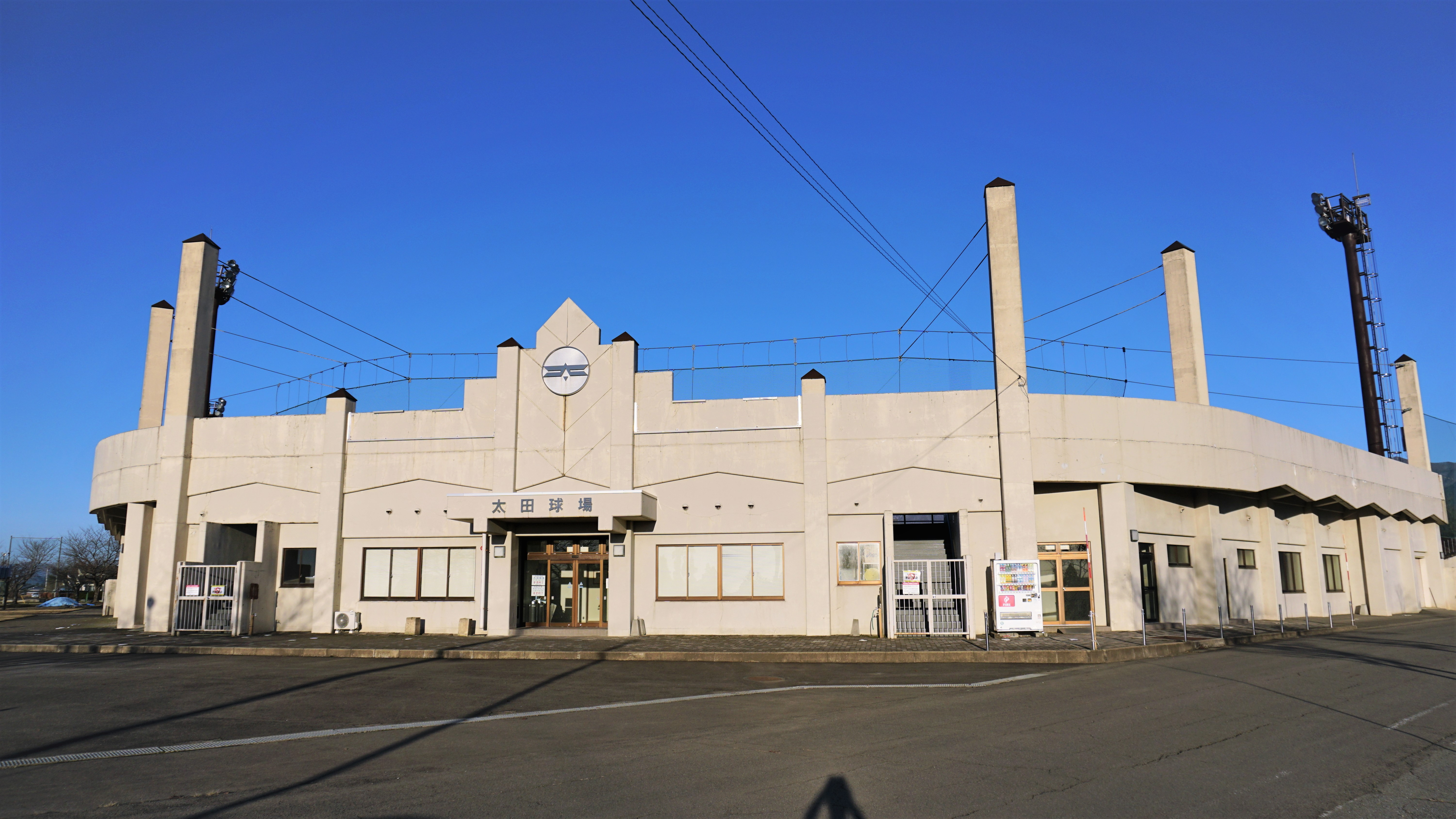 大仙市営太田球場 Sony ILCE-6300